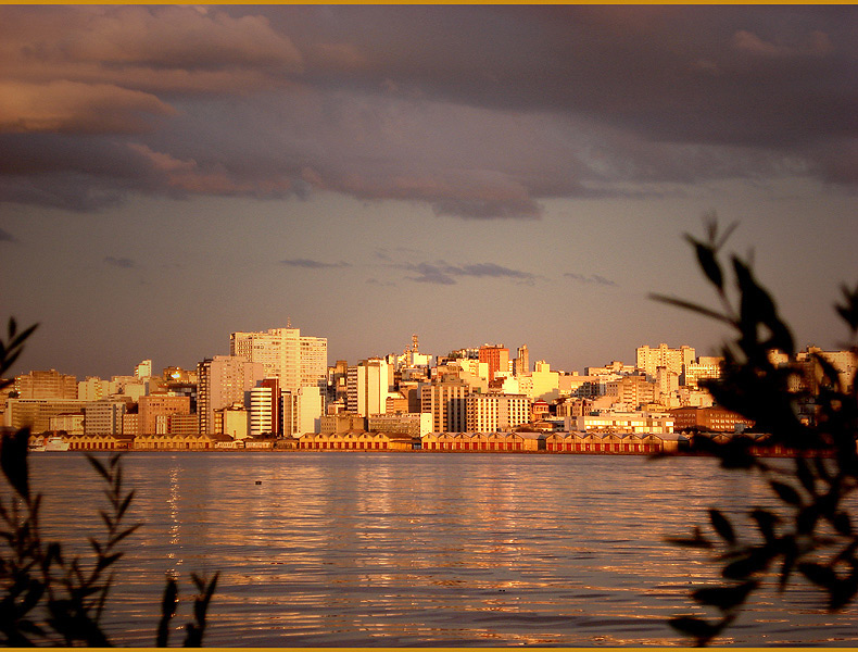 Centro de Porto Alegre, Brasil, ao pôr-do-sol.